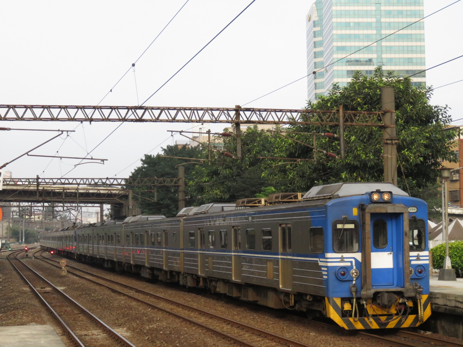 EMU500型3組12輛長編組區間車，擔任1006次進入桃園站